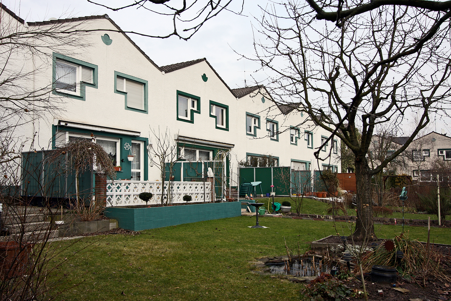 Amandus-Siedlung in Köln-Rheinkassel. Architekt: Gottfried Böhm